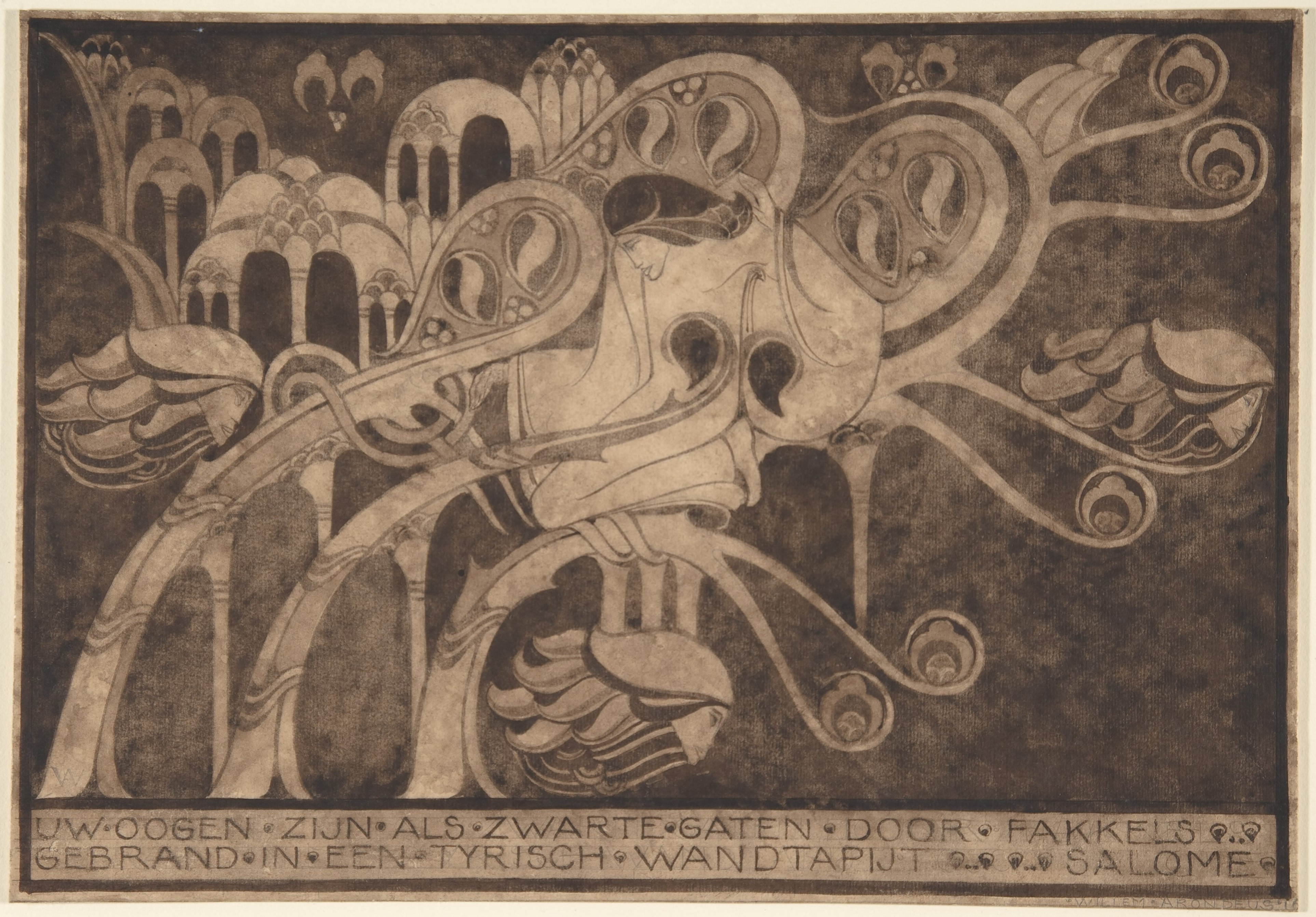 Salomé, tekening met potlood en inkt. Tekst: Uw oogen zijn als zwarte gaten door fakkels gebrand in een Tyrisch wandtapijt Salomé